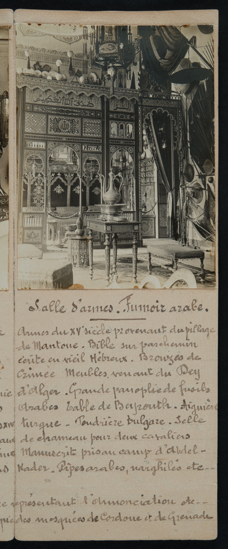 Musée Bonie, Salle d'armes et fumoir arabe avec inventaire manuscrit. (cliché Lysiane Gauthier, ville de Bordeaux).